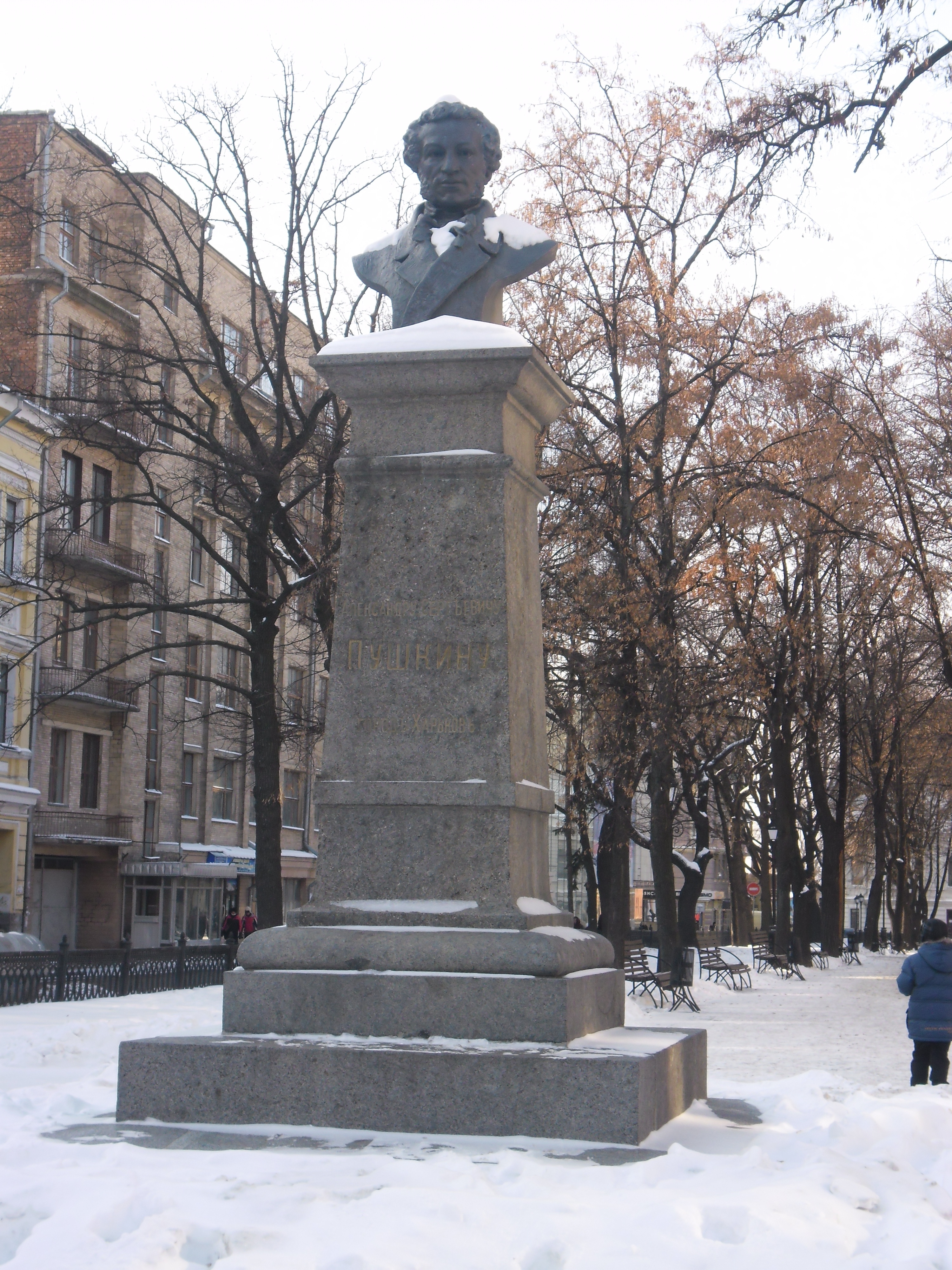 Памятник А. С. Пушкину в Харькове. Скульптор Б. В. Эдуардс. 1904 год.